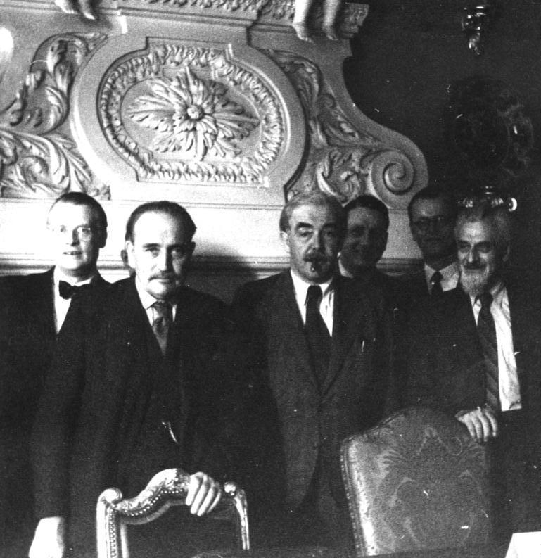 Länderratssitzung in Celle. In den Räumen des Celler Schlosses traten die Ministerpräsidenten der Länder der britischen Zone und die Bürgermeister von Hamburg und Bremen am 4-7-47 zu einer Länderratssitzung zusammen. Unser Bild zeigt von l.n.r.: Der Senatpräsident von Bremen, Kaisen - Ministerpräsident von Niedersachsen, Dr. Heinrich Wilhelm Kopf - und der Ministerpräsident von Schleswig-Holstein Hermann Lüdemann - aufgenommen während der Länderratssitzung im Celler Schloß. 7-7-47